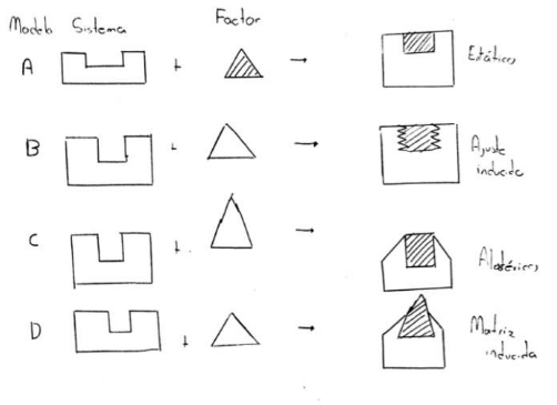 Tipos de relación entre un factor externo con un sistema proteínico.